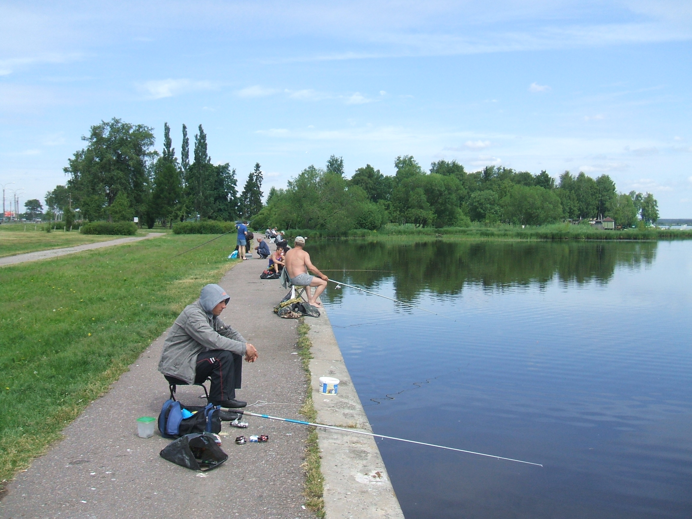 Сестрорецк СПб. Рыбалка на Сестрорецком Разливе